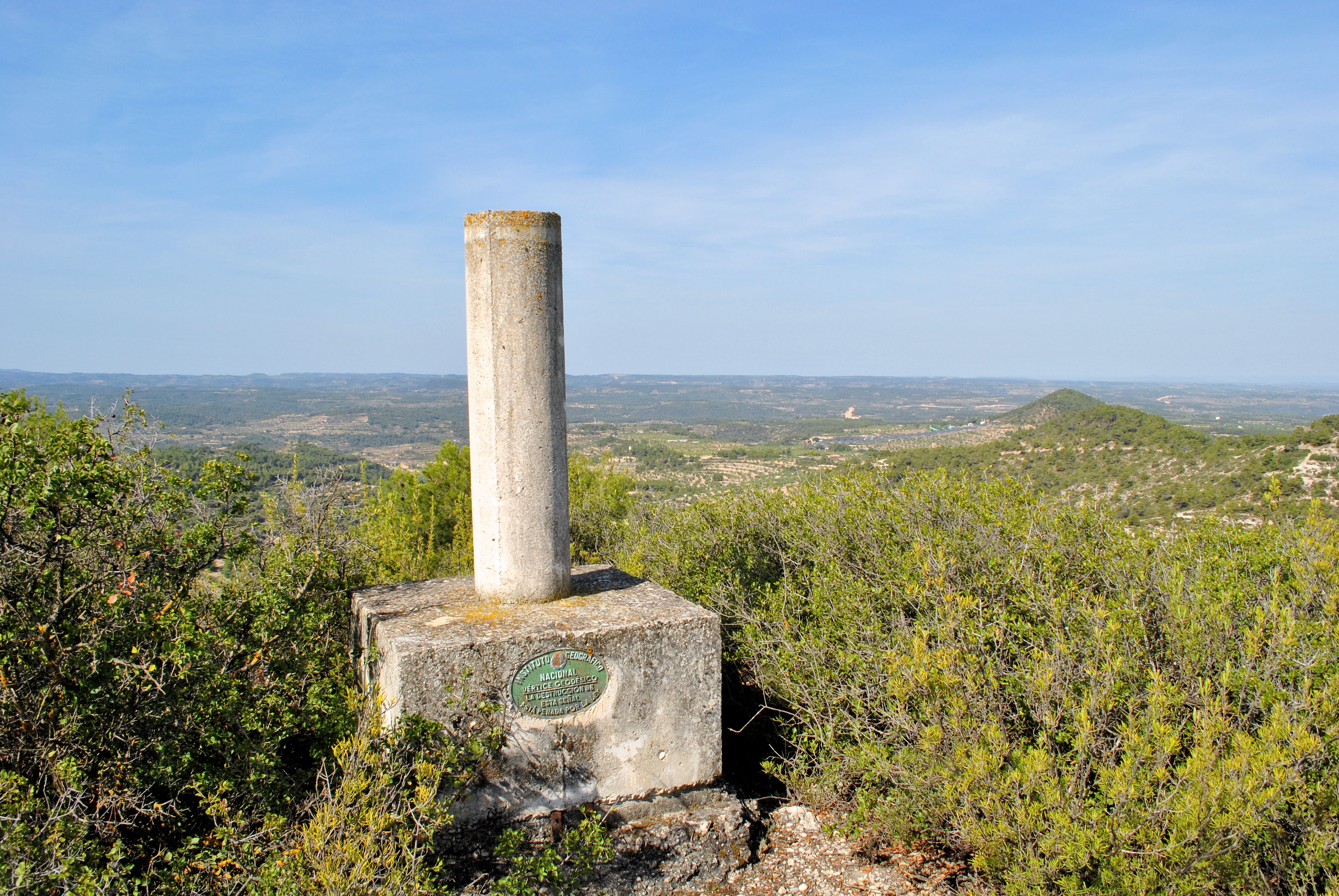 vértice geodésico situado a la punta del pouet (654m)